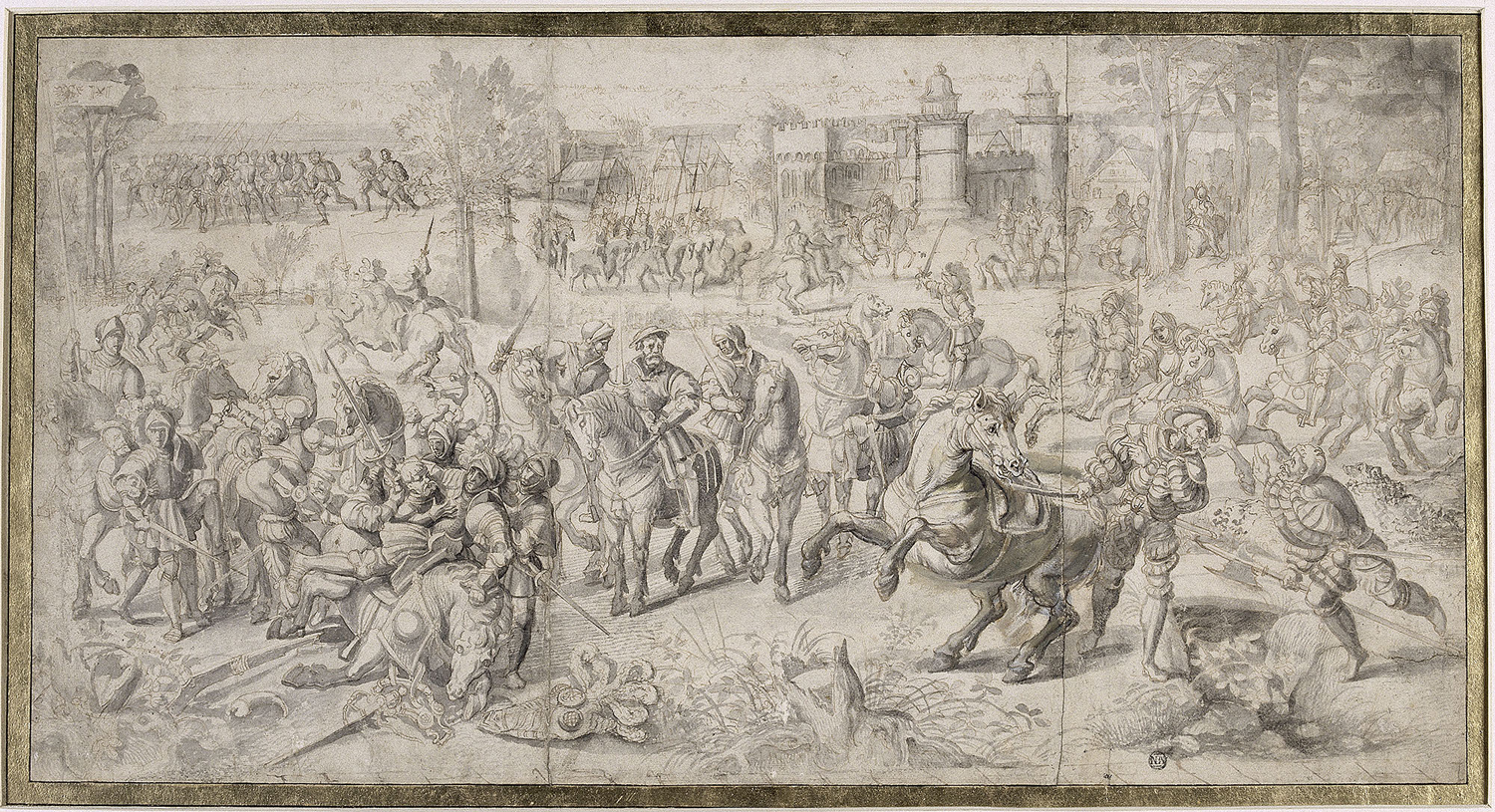 Drawing; Drawings